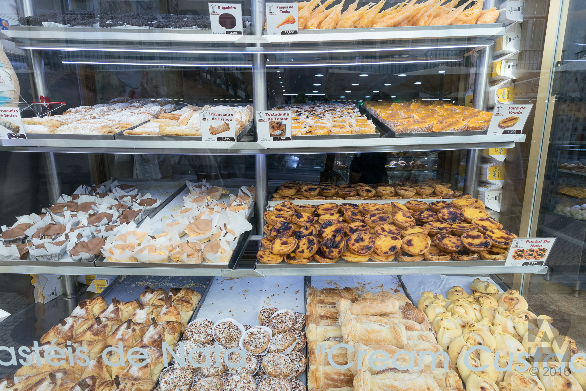 Lisboa